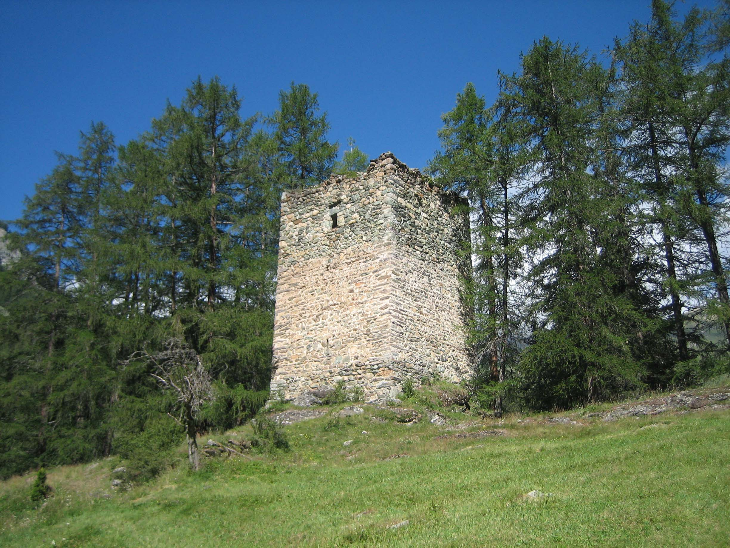 Turm Spliatsch